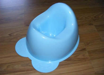 Pot de chambre